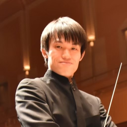 米本明が指揮棒を持っている写真